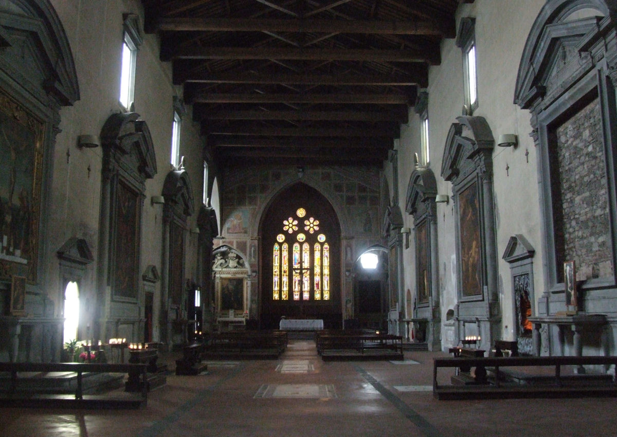 San Domenico, Pistoia, Italy